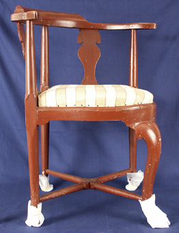 Så kallad puderstol från Bettna, 1700-talets förra hälft.